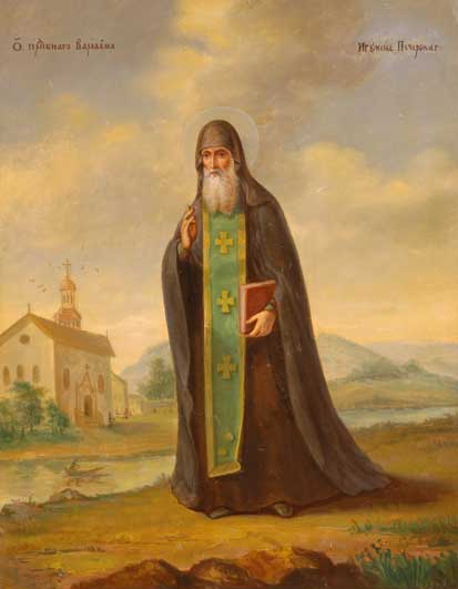 Saint Barlaam, the fisrt hegumen of Kyiv Caves monastery. Варлаам, ігумен Печерський - ? - бл. 1065 р. Преподобний. Пам'ять 11 жовтня і 2 грудня. Перший настоятель Печерського монастиря (1061-1062?). Син київського боярина Іоанна. Пострижений у ченці 19 листопада 1060 р. преподобним Никоном Великим. Став ігуменом Печерської общини приблизно у лютому 1061 р. За ігуменства Варлаама був закладений перший наземний дерев'яний монастир на Дальніх печерах. Незабаром князь Ізяслав Ярославич призначив прп.Варлаама ігуменом новоствореного "родового" Дмитрієвського монастиря у Києві. На початку 1060-х років преподобний здійснив паломництва до Палестини та Константинополя. Повертаючись з другої подорожі, занедужав і вимушений був зупинитися у Володимирському Святогорському Зимненському монастирі, де і помер. Перед смертю прп.Варлаам заповів усе, куплене ним у Греції для власного монастиря, передати Печерській обителі. Його мощі спочивають у Ближніх печерах.